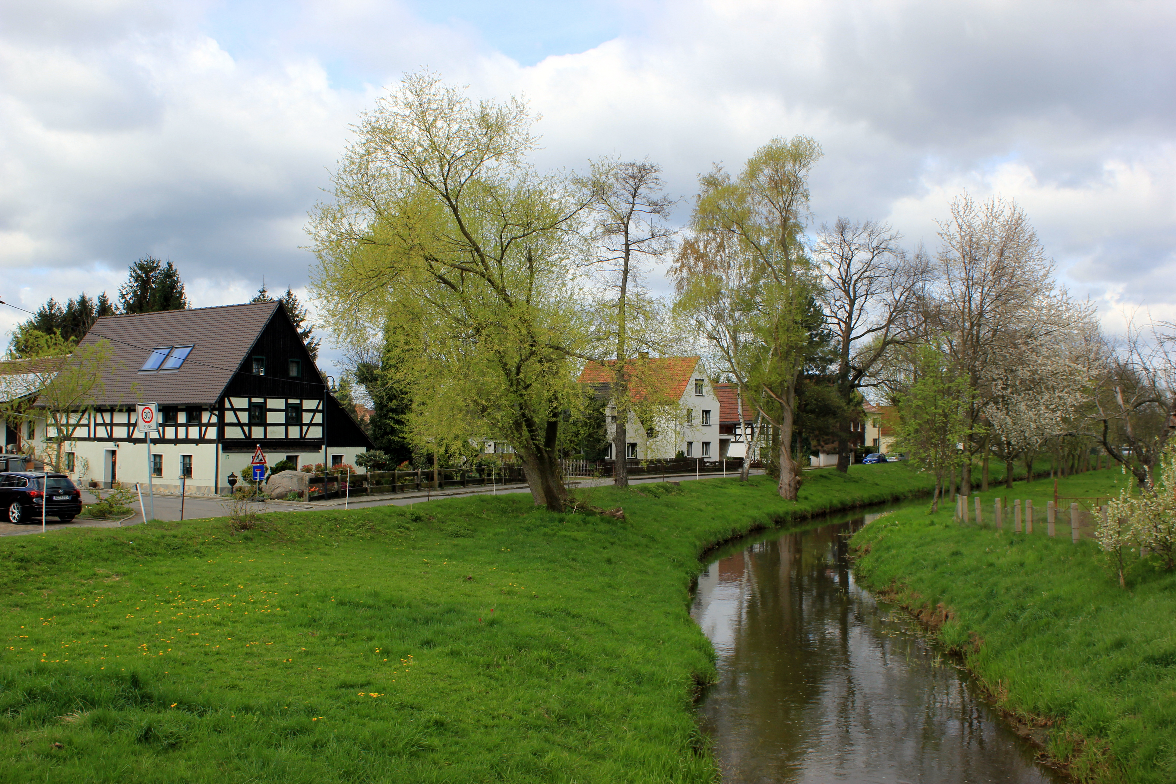 Hornjoserbsce: Čornica we Wulkich Zdźarach.